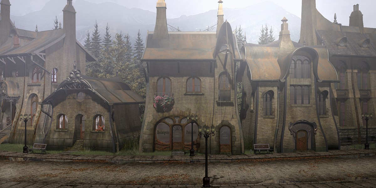 Capture d'écran du jeu vidéo Syberia (2002), développé et édité par Microïds. Vue de la rue principale de Valadilène, village français fictif situé dans les Alpes, premier endroit exploré par l'héroïne Kate Walker au début du jeu.